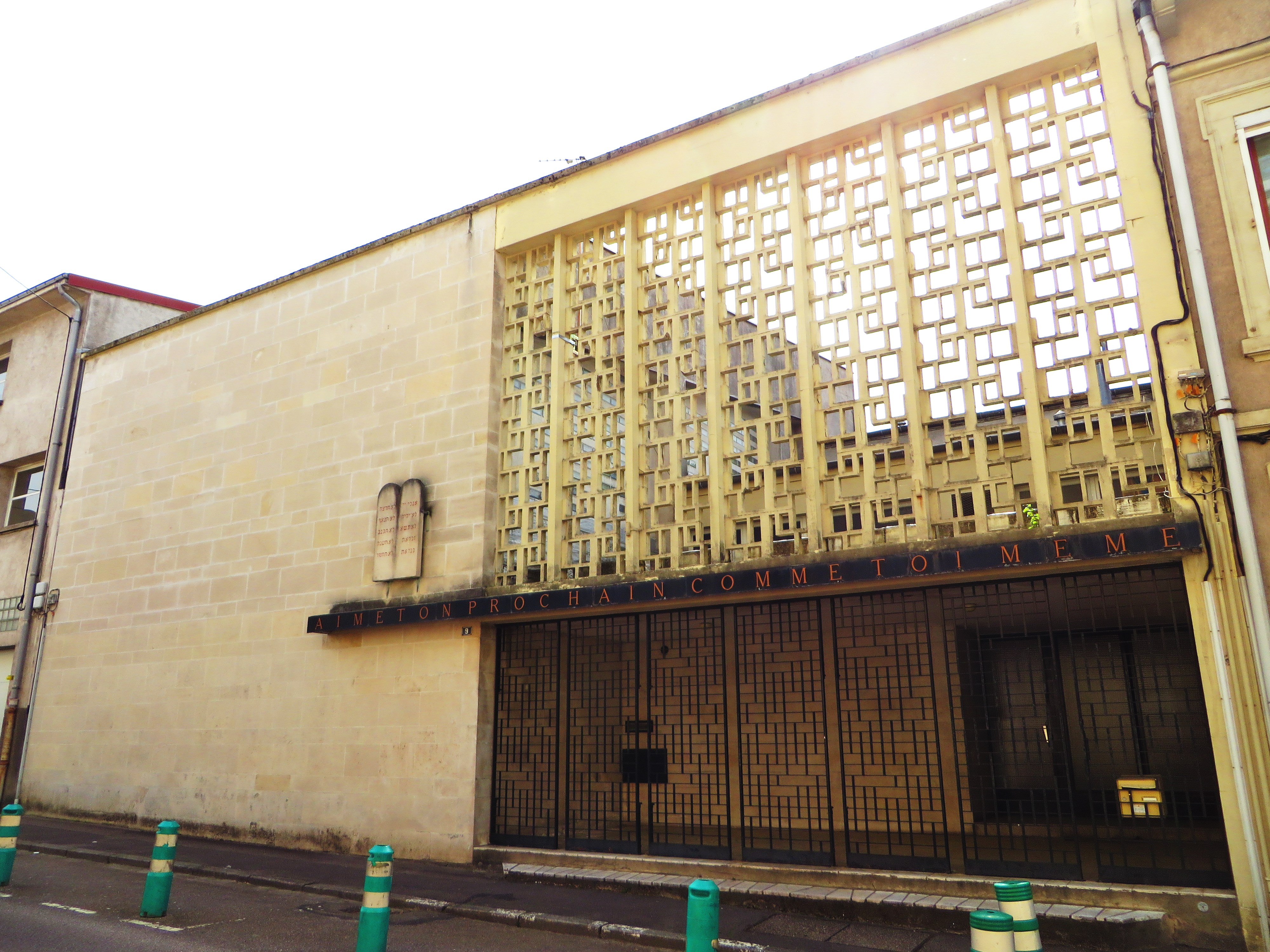 Epinal synagogue